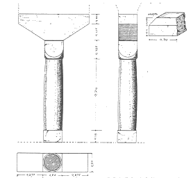 Säulenschäfte des Wohnturmes der "Alten Burg" bei Homburg-Einöd